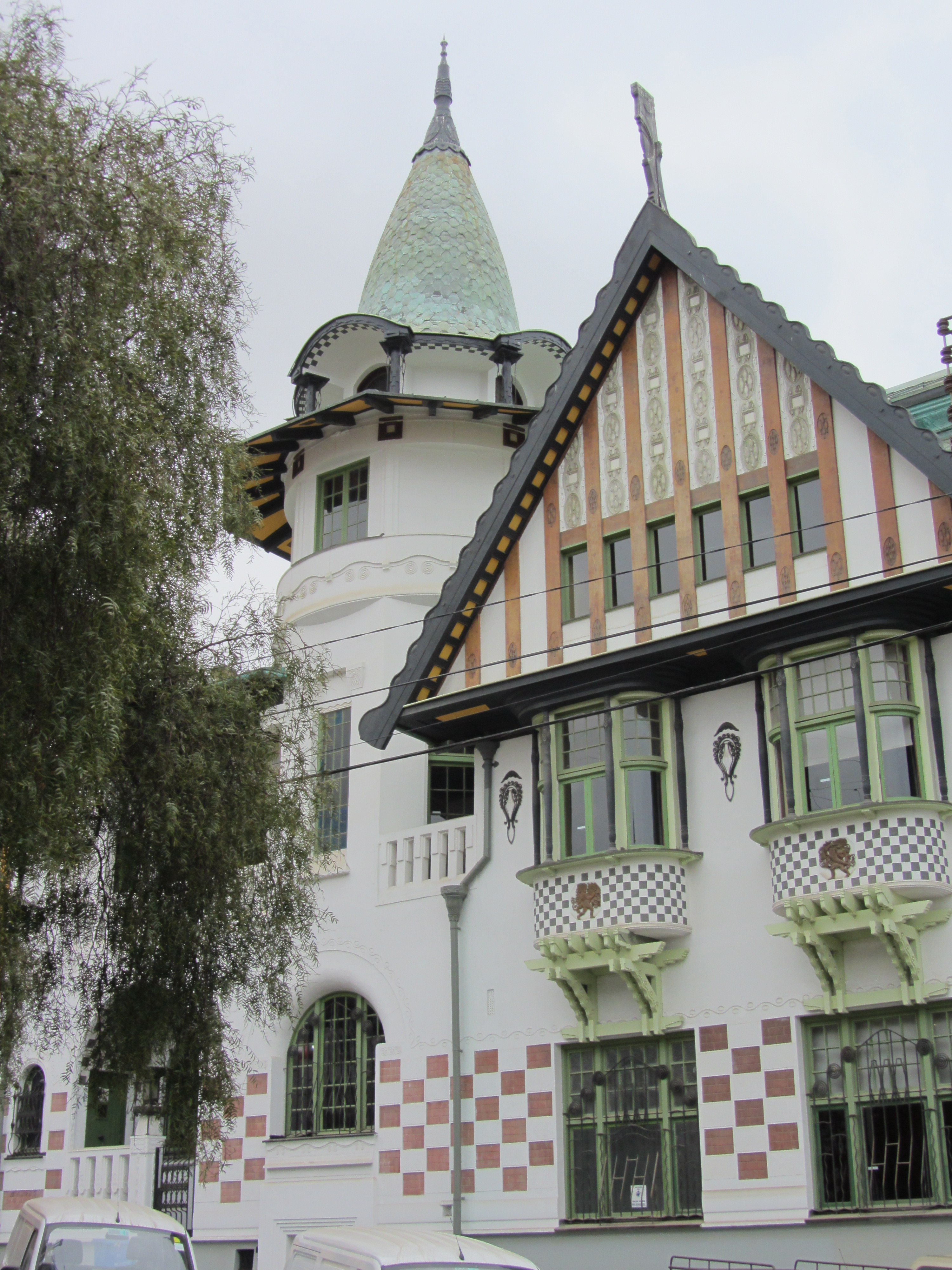 Palacio Baburizza, sede del Museo Municipal de Bellas Artes de Valparaíso, 2014